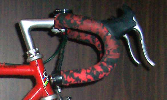 Handlebar of sport bike